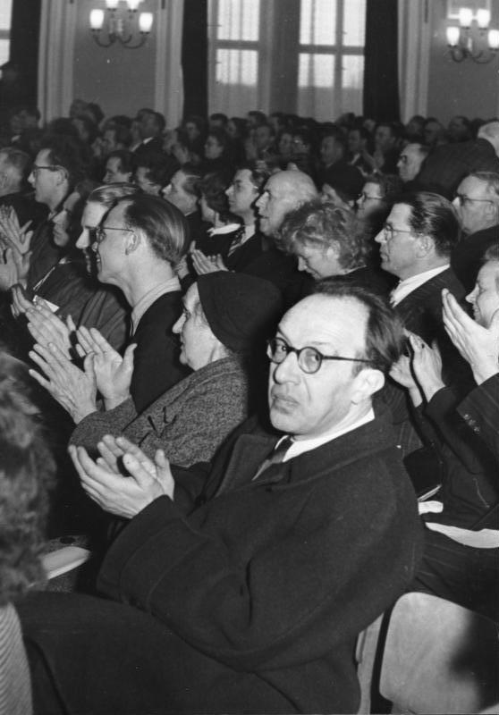 Berlin, Beethoven-Ehrung Zentralbild/Schmidtke, 26.3.52 Deutsche Beethoven-Ehrung 1952 Sinfonie-Konzert am 26.3.52 im RAW Treptow. Das Gewandhausorchester Leipzig spielte unter Leitung des Nationalpreistägers Prof. Franz Konwitschny die Sinfonie Nr. 8 F-dur op.93, das Konzert für Klavier und Orchester Nr. 2 B-dur op.19 und die Sinfonie Nr. 5 C-moll op. 67. UBz: Unter den Zuhörern Prof. Knepler von der Musikhochschule Berlin. Abgebildete Personen: Knepler, Georg Prof. Dr.: Direktor des Musikwissenschaftlichen Institutes der Universität Berlin, DDR